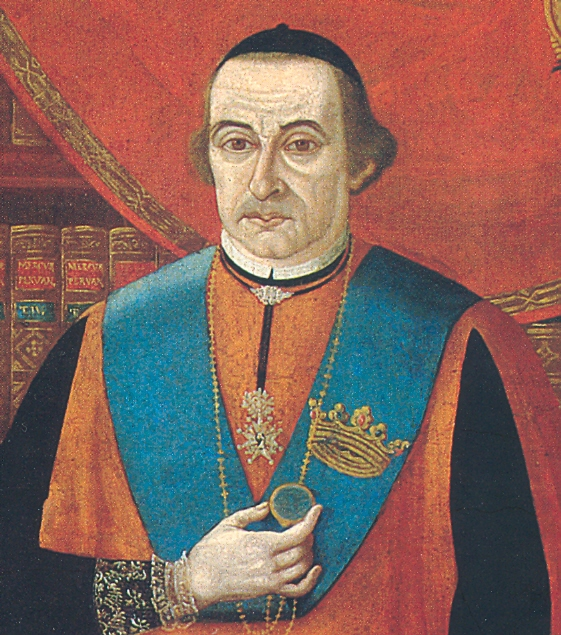 José Baquíjano y Carrillo (1751-1817), III conde de Vistaflorida.